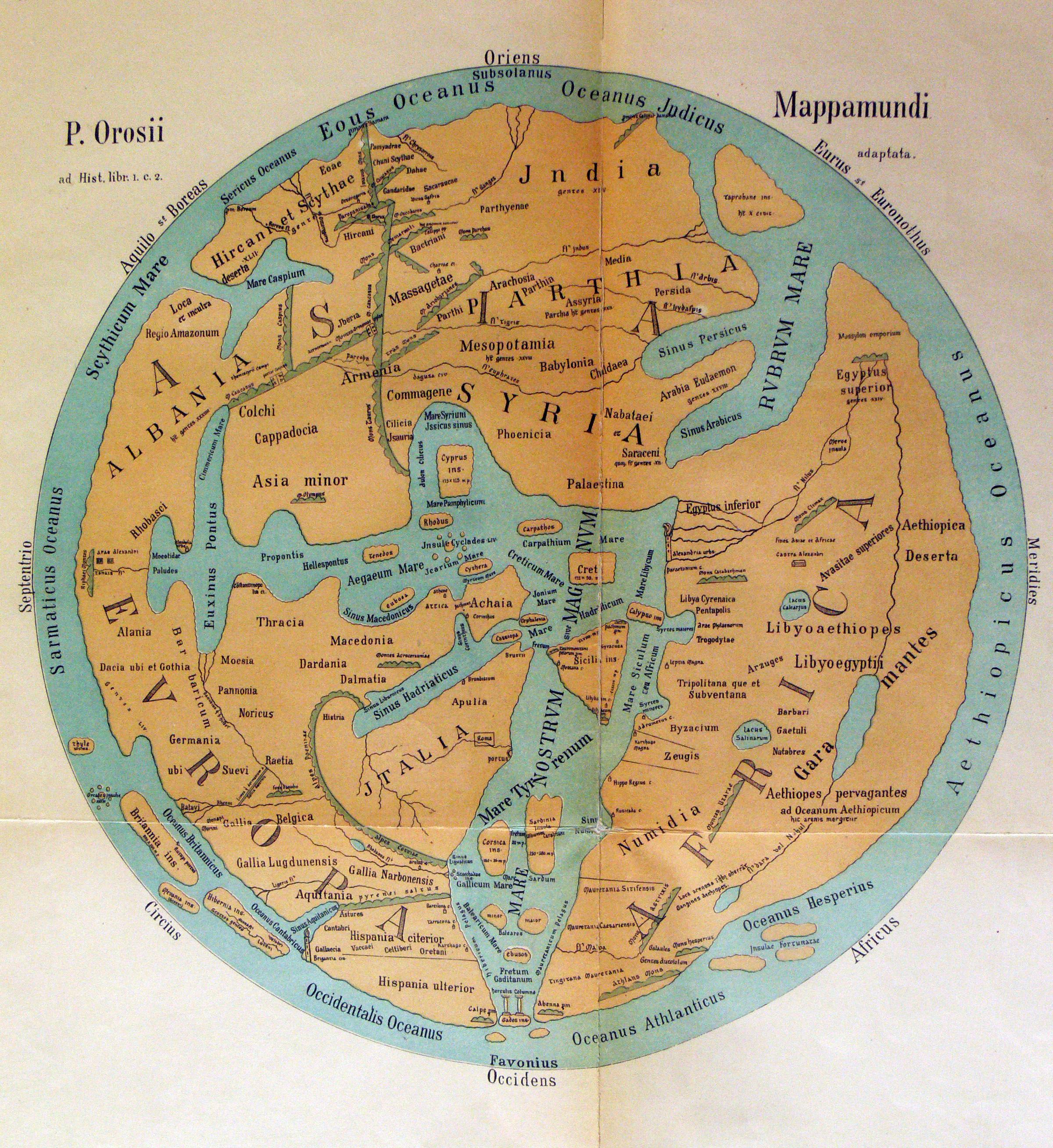 Weltkarte des Orosius